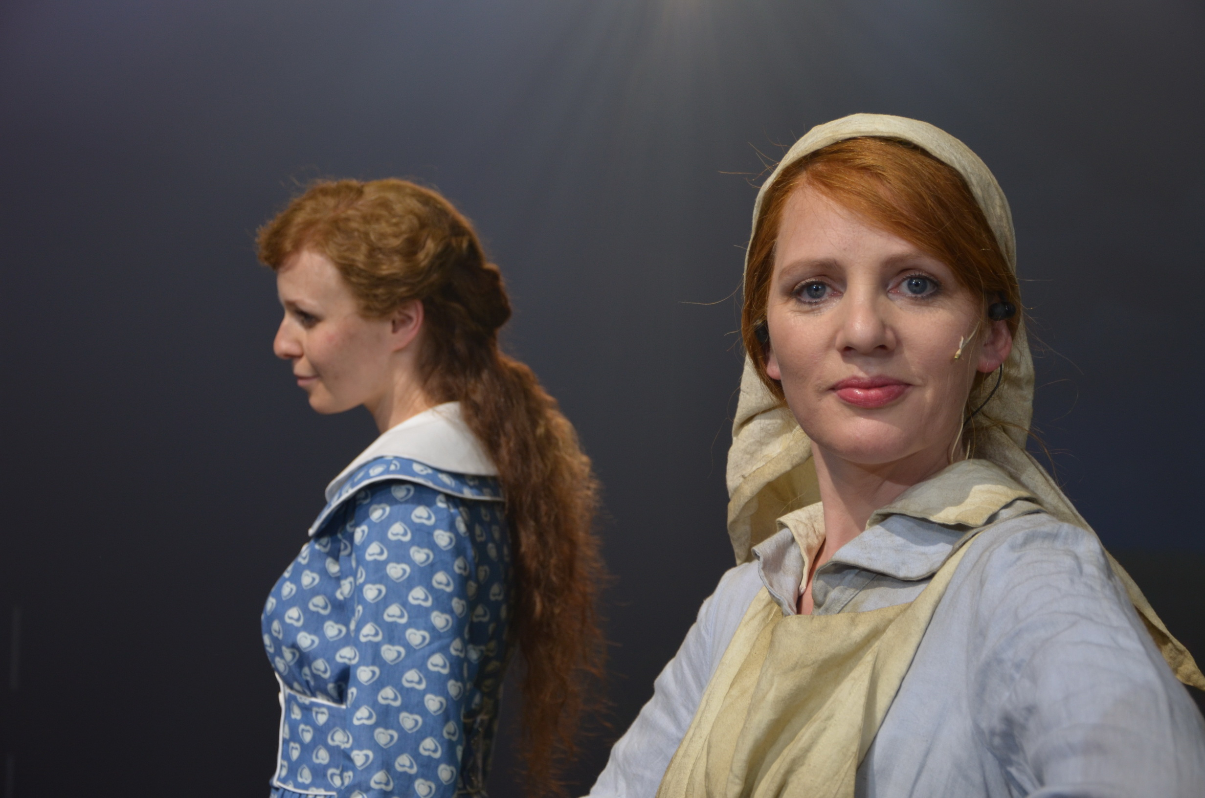 Maaike Cafmeyer tijdens de open repetitie van de spektakelmusical 14-18